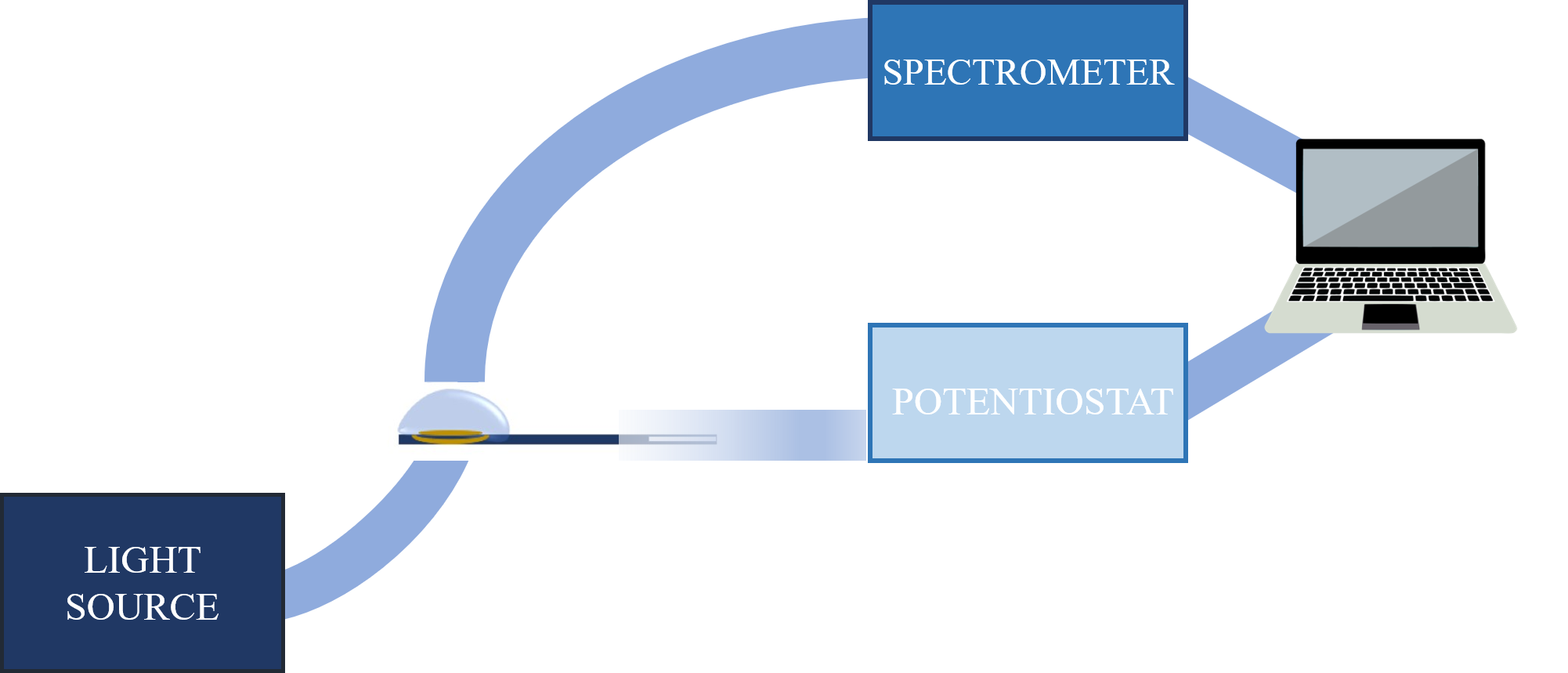 Normal transmission scheme